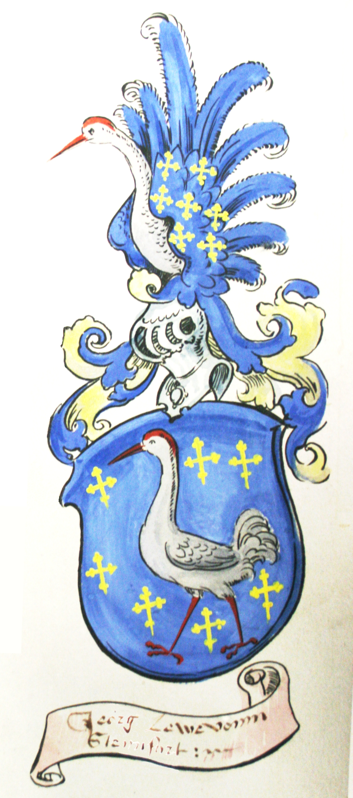 Wappen des Friedberger Burgmannen Georg Löw von Steinfurth im Salbuch des Kloster Naumburg, Buchmalerei des 16. Jahrhunderts.